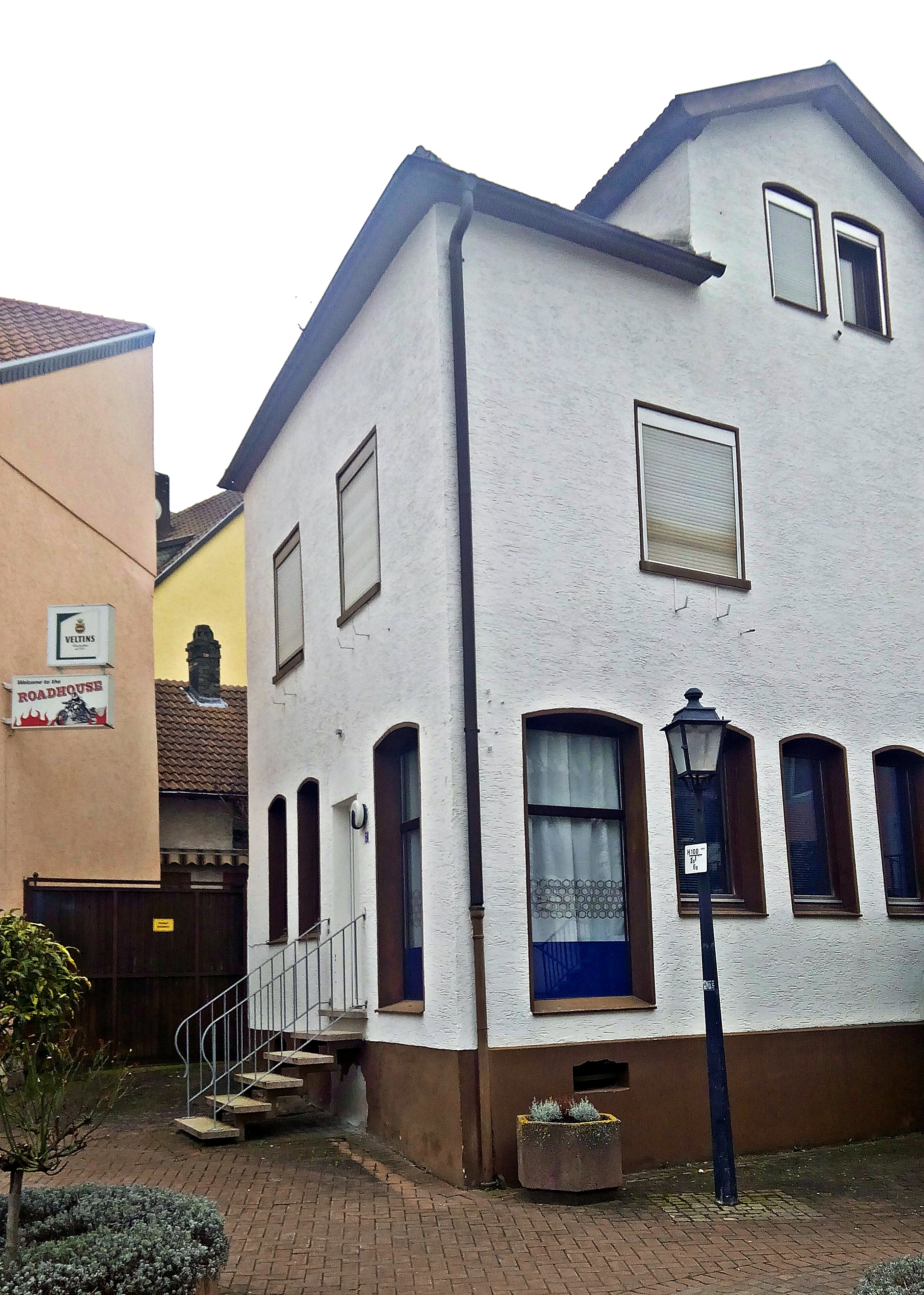 Grünstadt, Schillerplatz 7, Tatort des Mordes an Anna Mehle, 1928